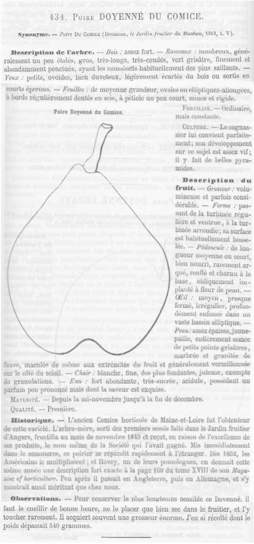 Image scannée de l'ouvrage 'Dictionnaire de pomologie' (tome 2, pages 60-62) André Leroy - 1867